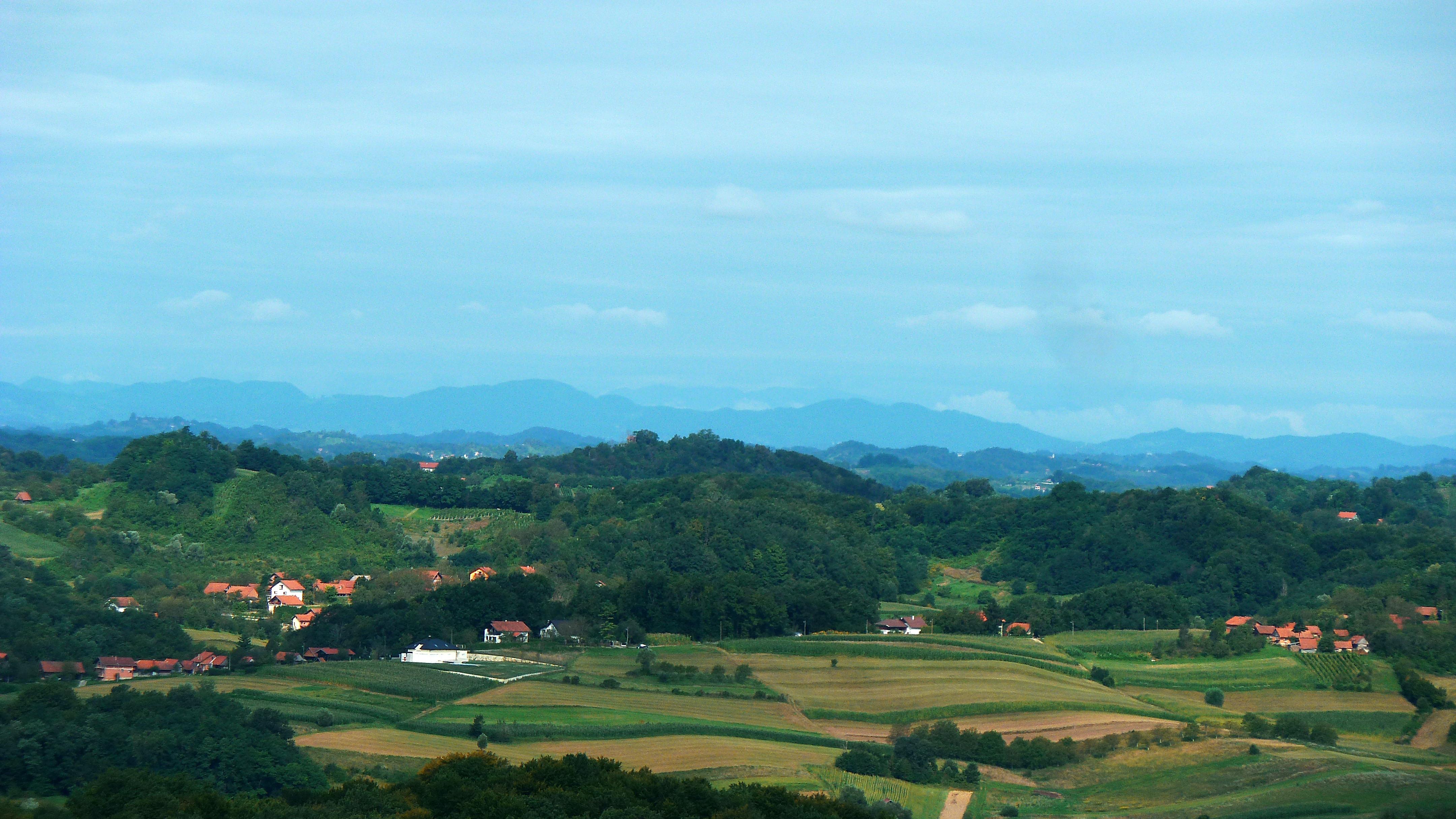 Pogled s balkona